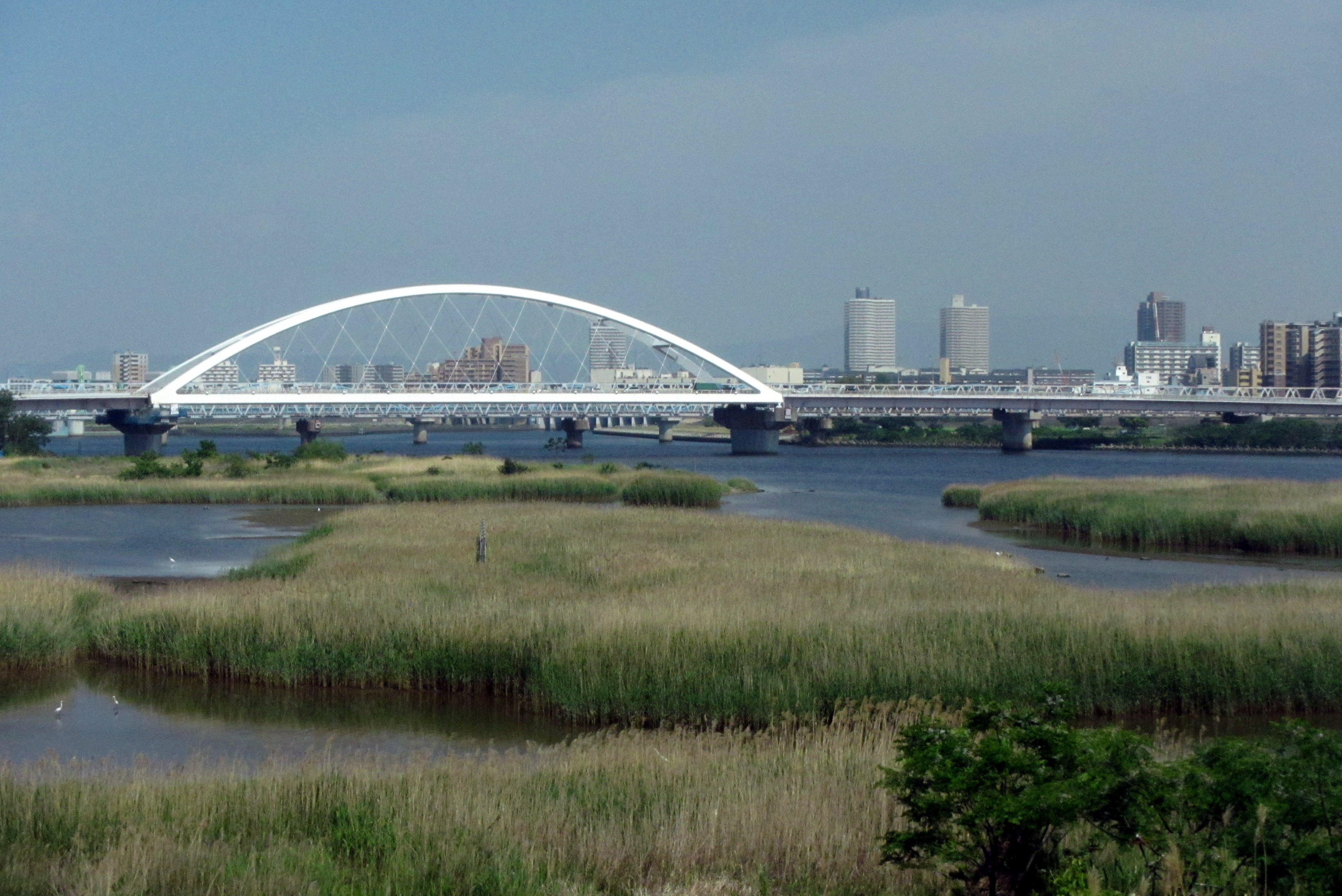 淀川天神橋筋